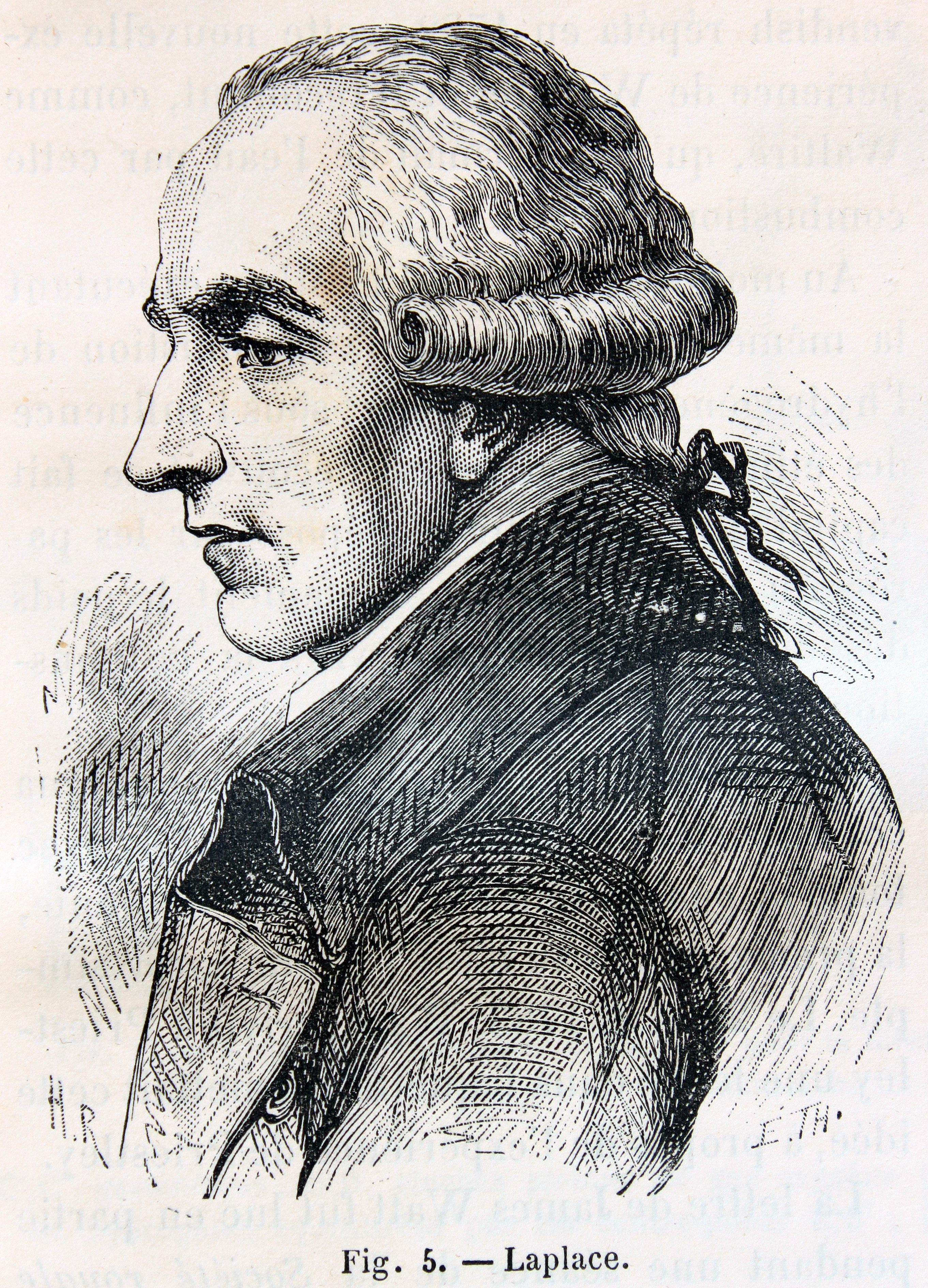 Les merveilles de l'industrie ou, Description des principales industries modernes, Louis Figuier. Paris : Furne, Jouvet, 1873 -1877. Tome 3.